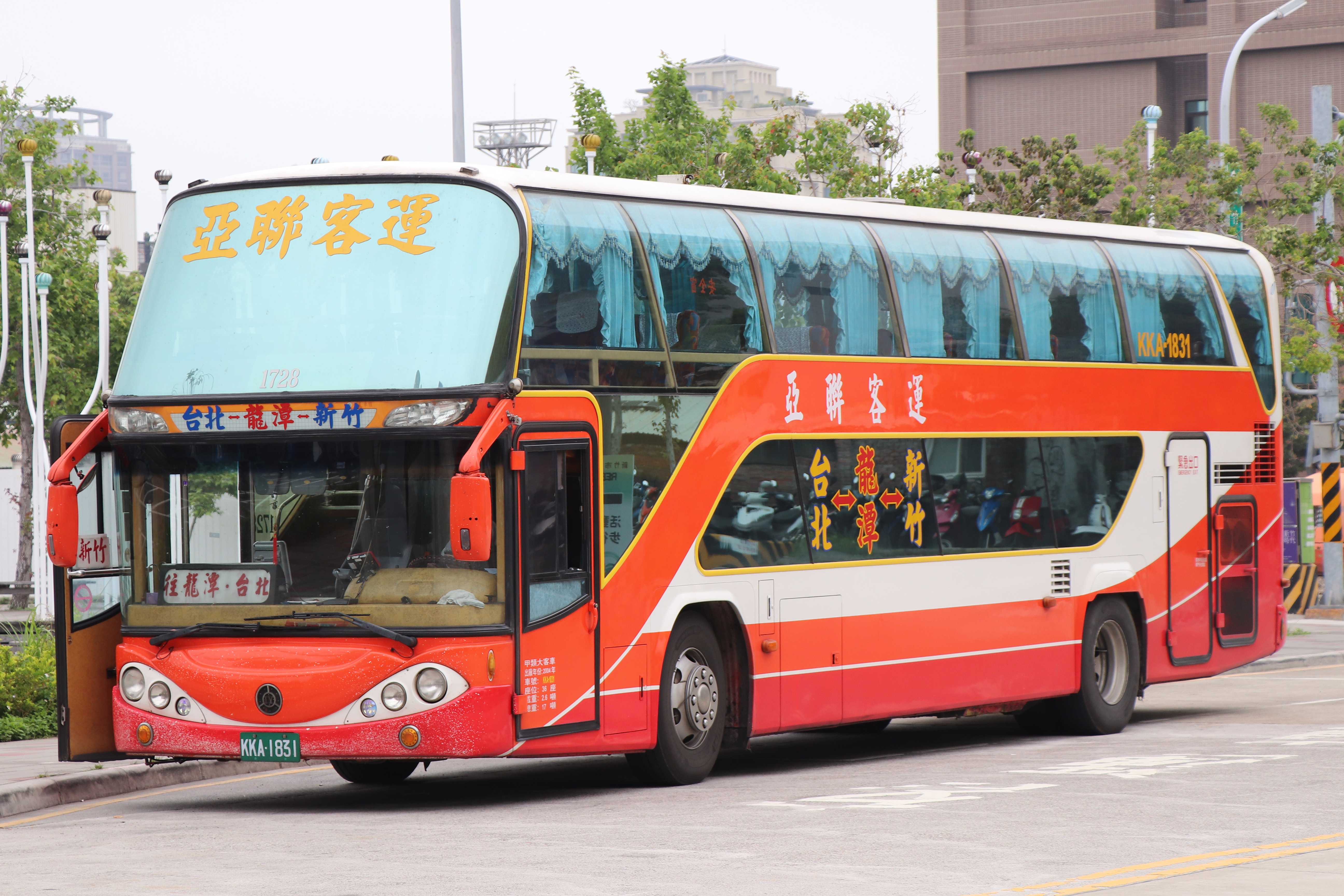 亞聯客運 FUSO RP517PL大客車 KKA-1831